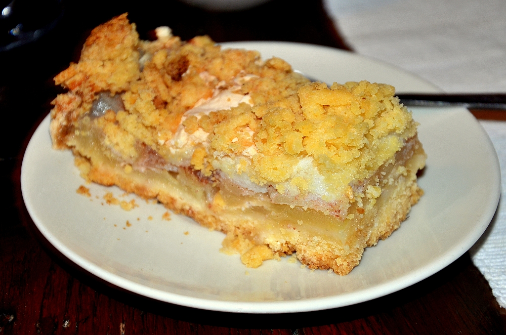 Apfelkuchen, Sanok 2013